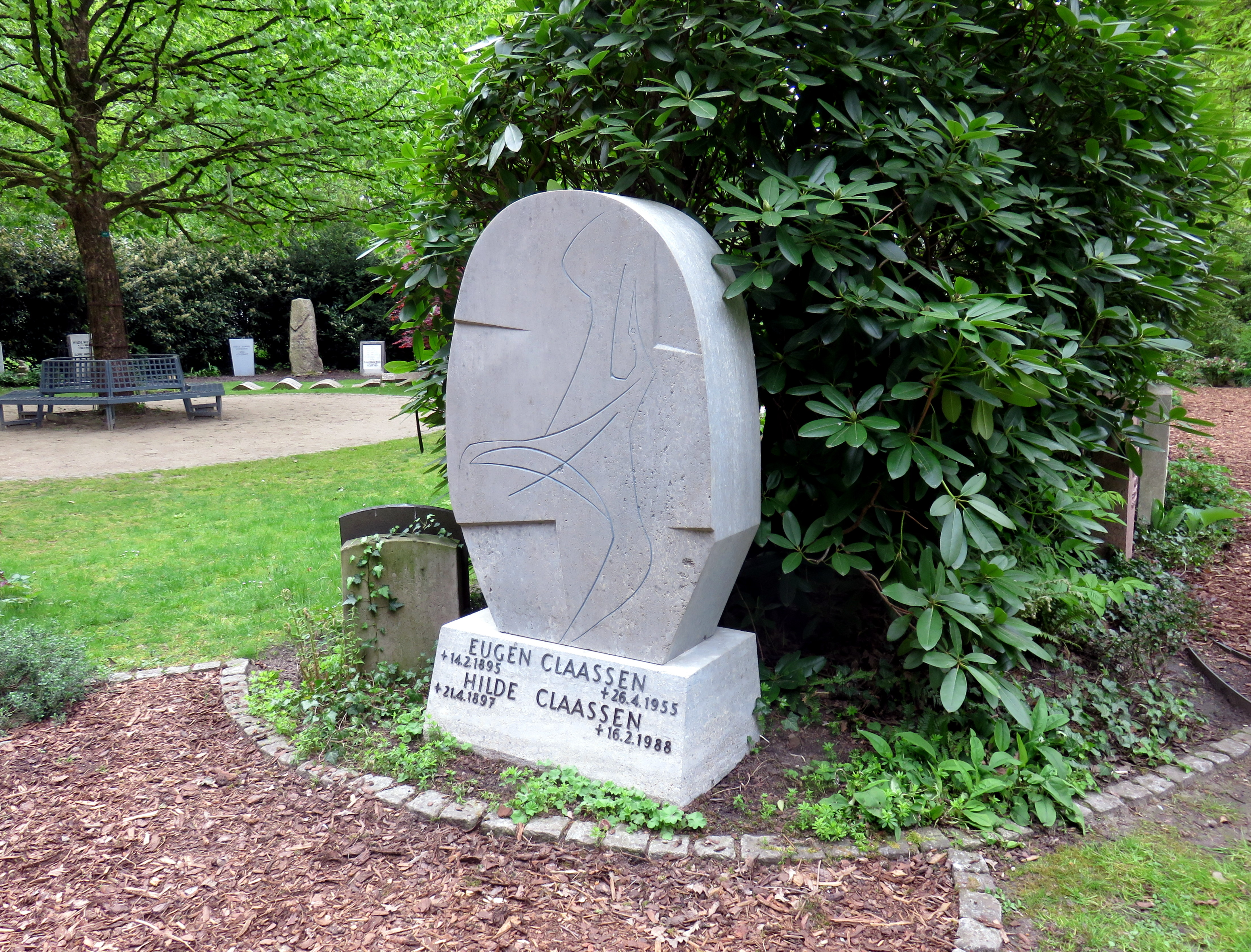 Historischer Grabstein der deutschen Kunsthistorikerin und Verlegerin Hildegard Claassen (und ihres Ehemannes, des deutschen Verlegers Eugen Claassen) im Bereich des Gartens der Frauen, hierher verlegt Ende April 2020 nach Ablauf der ursprünglichen Grabstätte. Der Grabstein wurde 1955 vom deutschen Bildhauer Hans Martin Ruwoldt geschaffen.